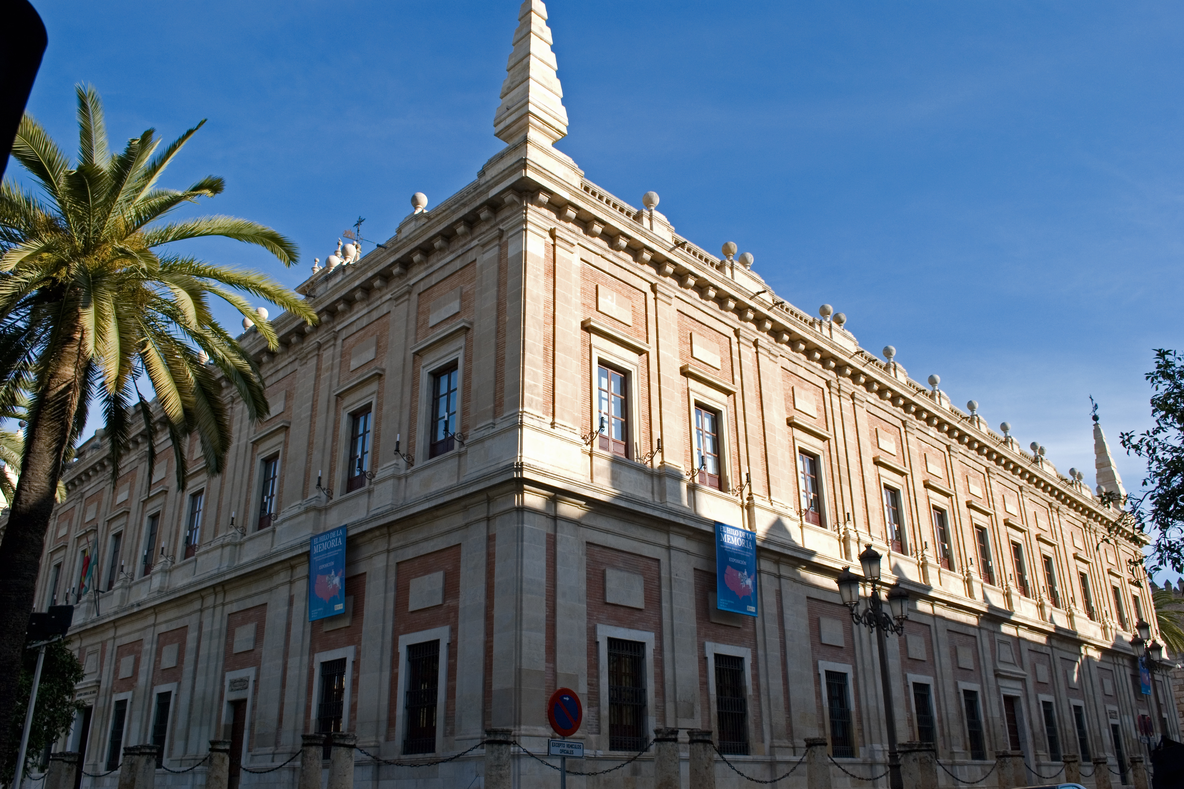 Archivo de Indias, en Sevilla. Antigua Casa de Contratación.